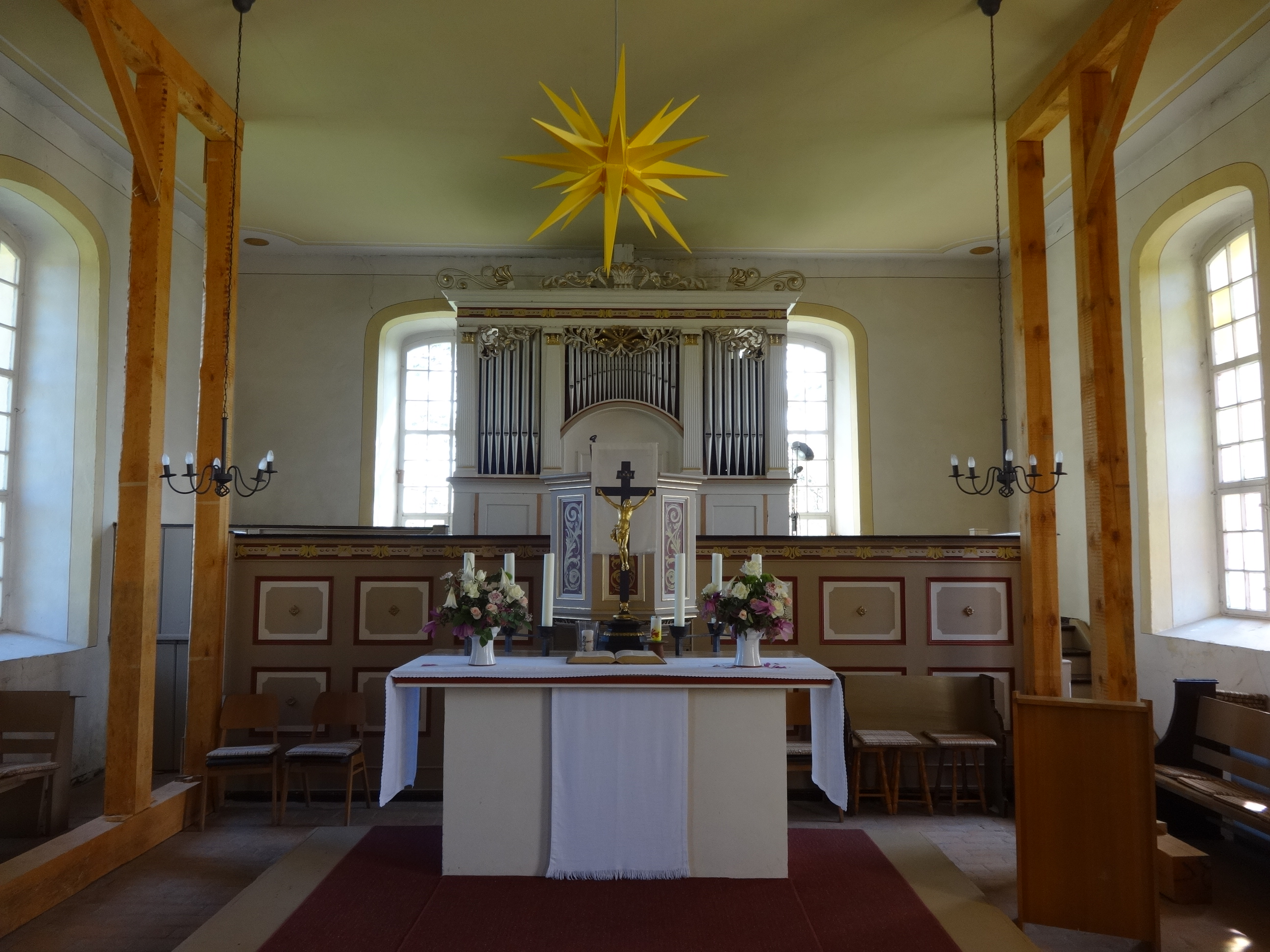 Die evangelische Dorfkirche in Reichenwalde wurde am Ende des 13. Jahrhunderts als Feldsteinkirche errichtet. In der zweiten Hälfte des 18. Jahrhunderts erfolgreichen zahlreiche Umbaumaßnahmen. Dabei wurden unter anderem der Westturm um ein barockes Geschoss in Fachwerk aufgestockt und die Fenster vergrößert. Im Innern befinden sich ein Altarkreuz aus Reddern sowie eine Grueneberg-Orgel von 1864 mit einem dreiteiligen Prospekt.